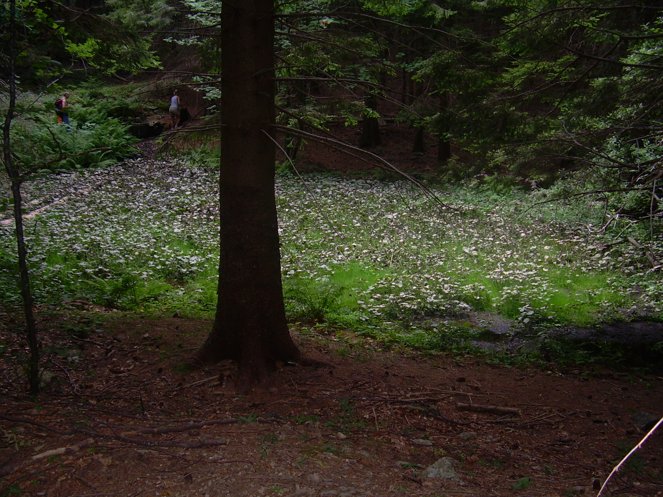 Piccola palude all'interno della Foresta delle Lame, nell'Appennino Ligure.